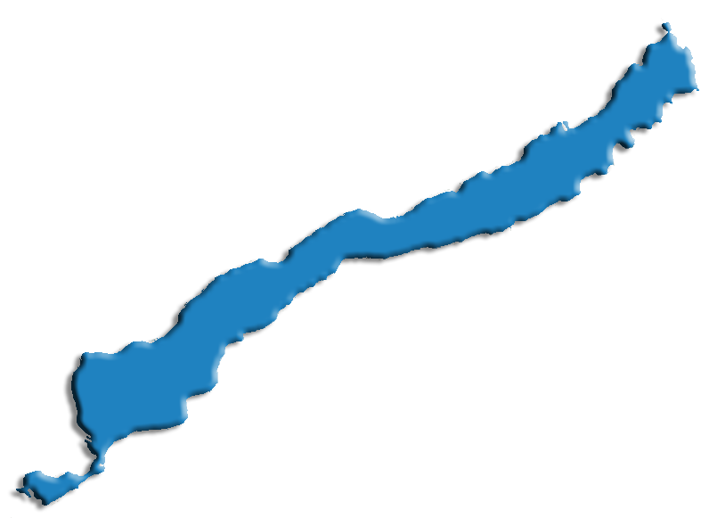 Mapa de Cololo una laguna de origen glaciar en el departamento de La Paz, Bolivia.